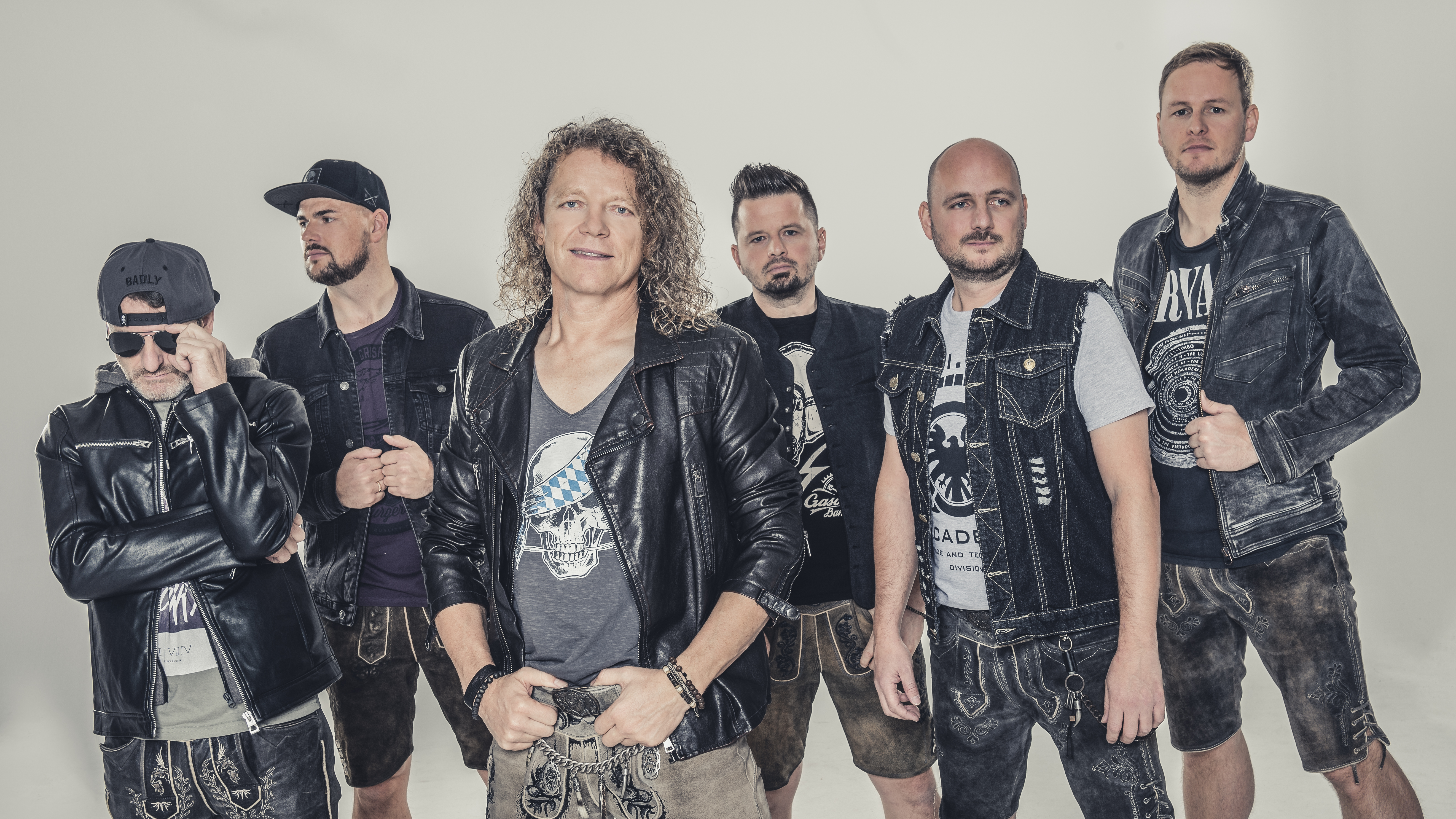 Offizielles Pressebild der Troglauer 2019